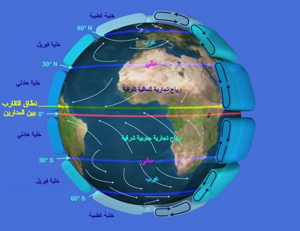 تصوير دوران الغلاف الجوي العالمي للأرض